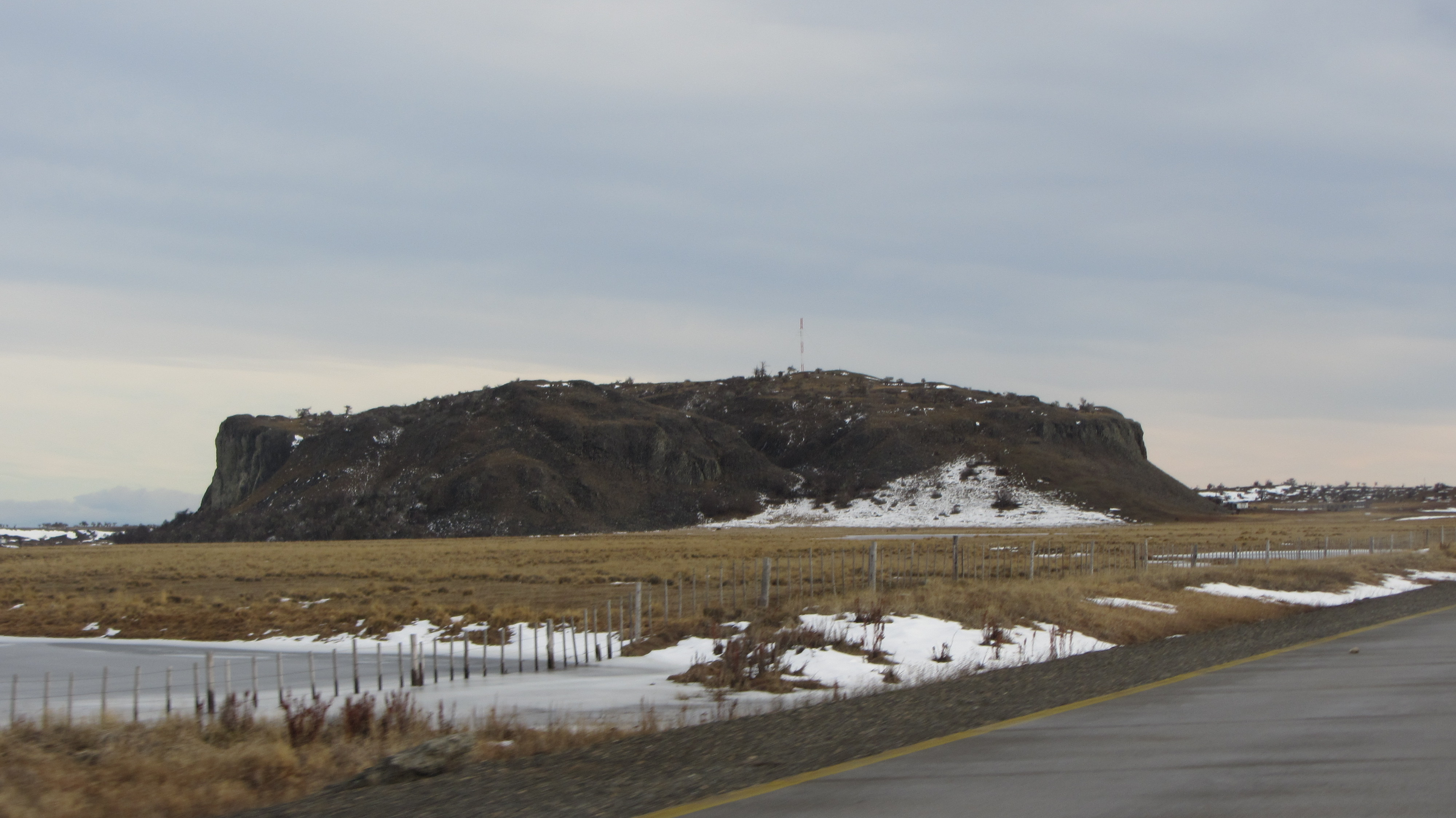 Morro Chico comuna de Laguna Blanca Magallanes, Chile This is a photo of a national monument in Chile: 190